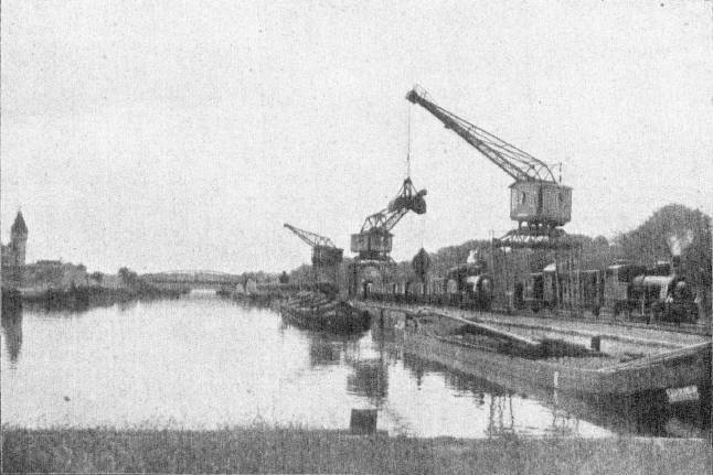 Der Tegeler Industriehafen. Ausgangspunkt der Industriebahn Tegel–Friedrichsfelde. Original-Aufnahme der Photogr. Kunstanstalt Unger & Sohn, Berlin-Tegel, Schönebergerstr. 71.